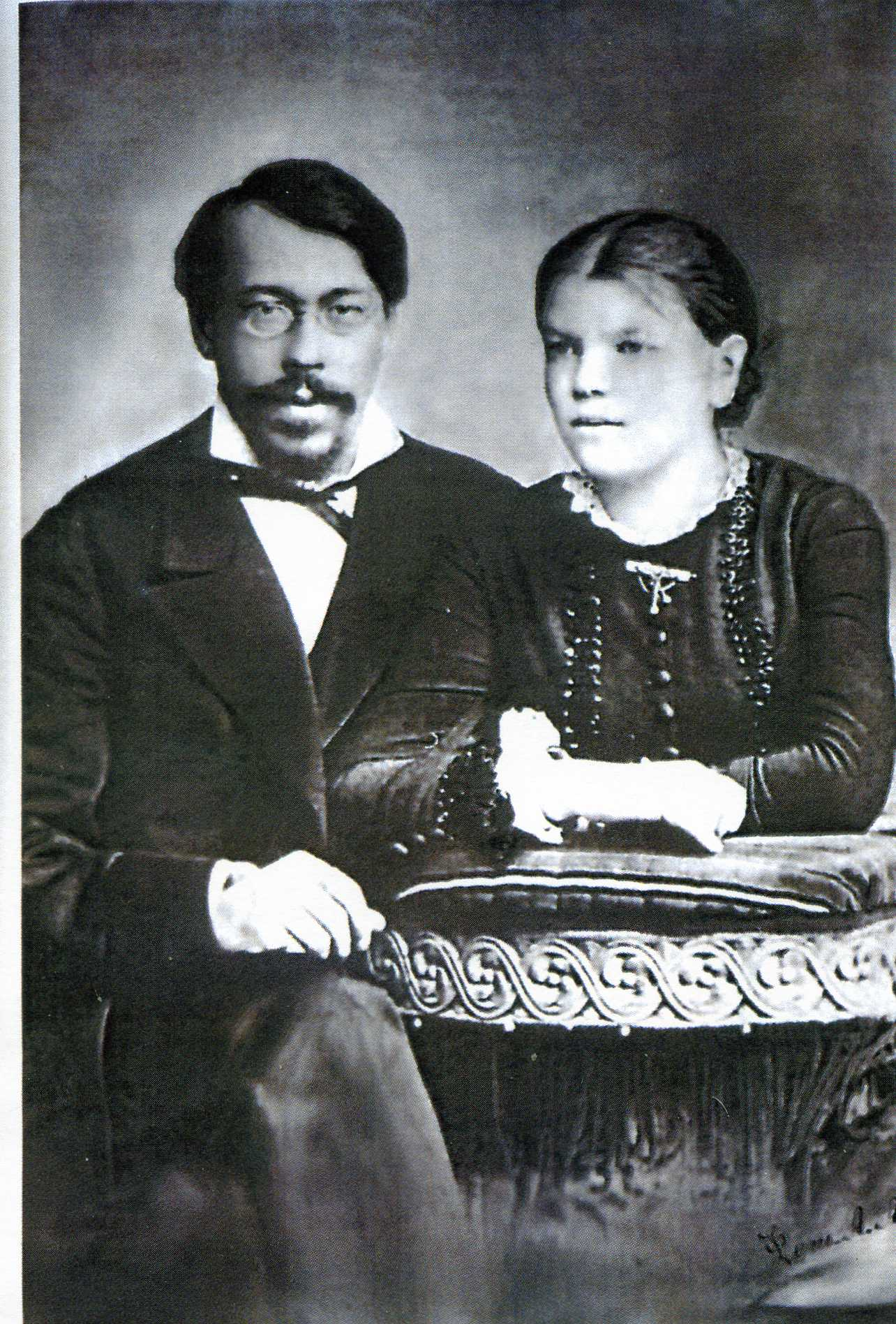 Мария Васильевна (1870-1930) и Яков Николаевич (1964-1919) Соколовы